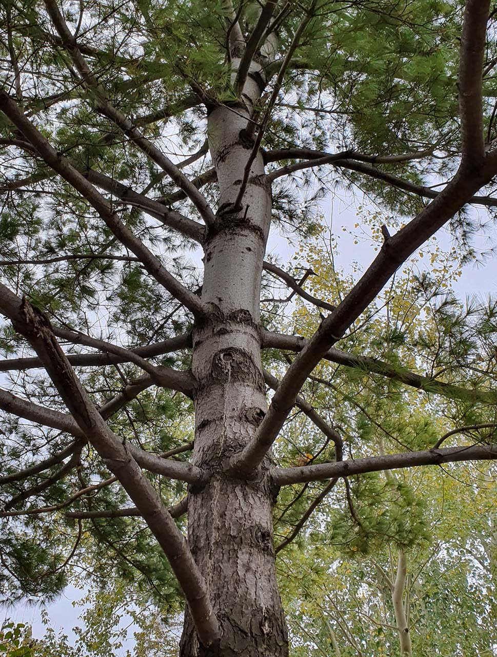 Веймутова сосна на набережной города Самары. Структура коры.